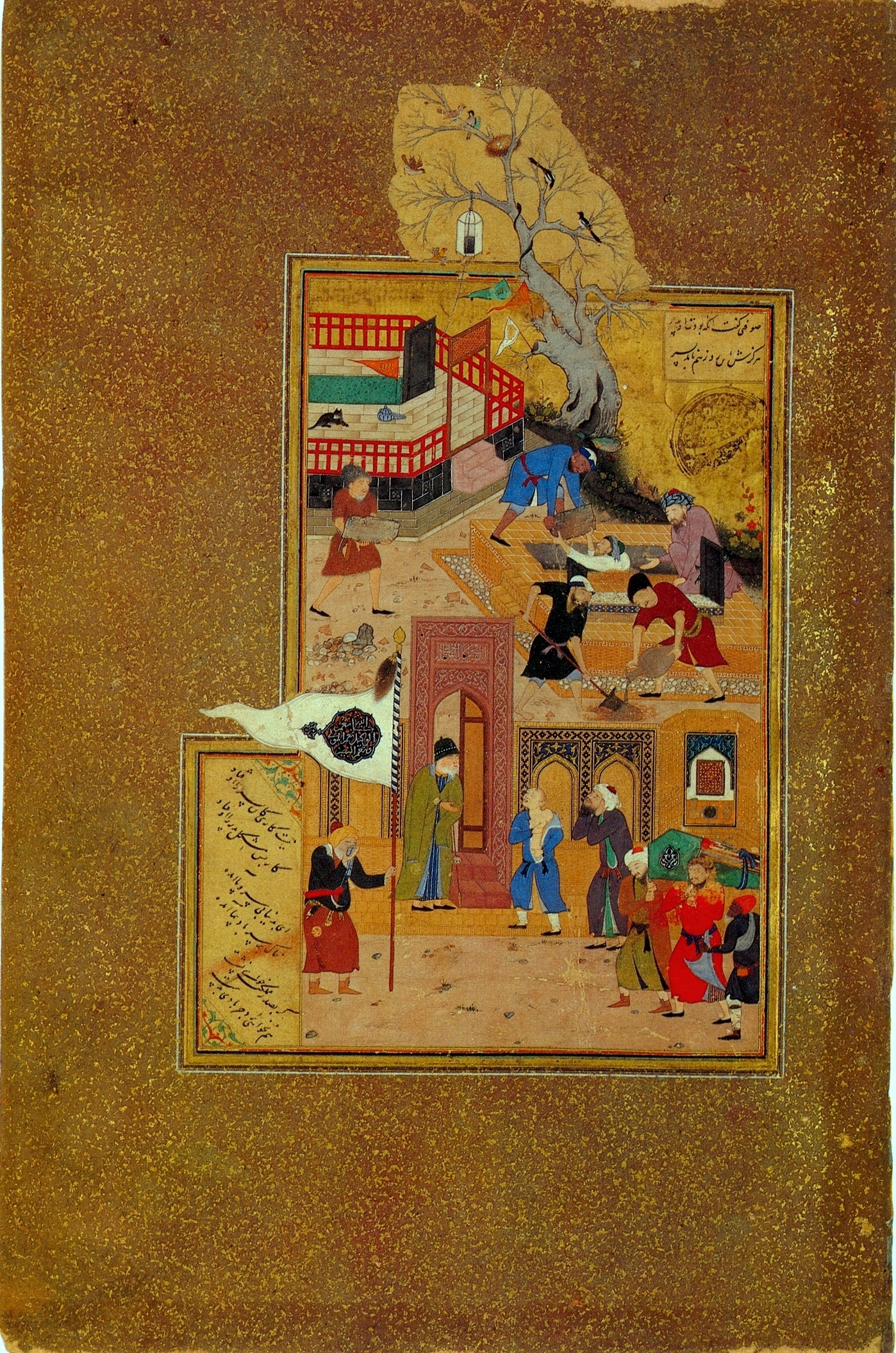 Behzad.Похороны._Аттар._Беседы_птиц_1486